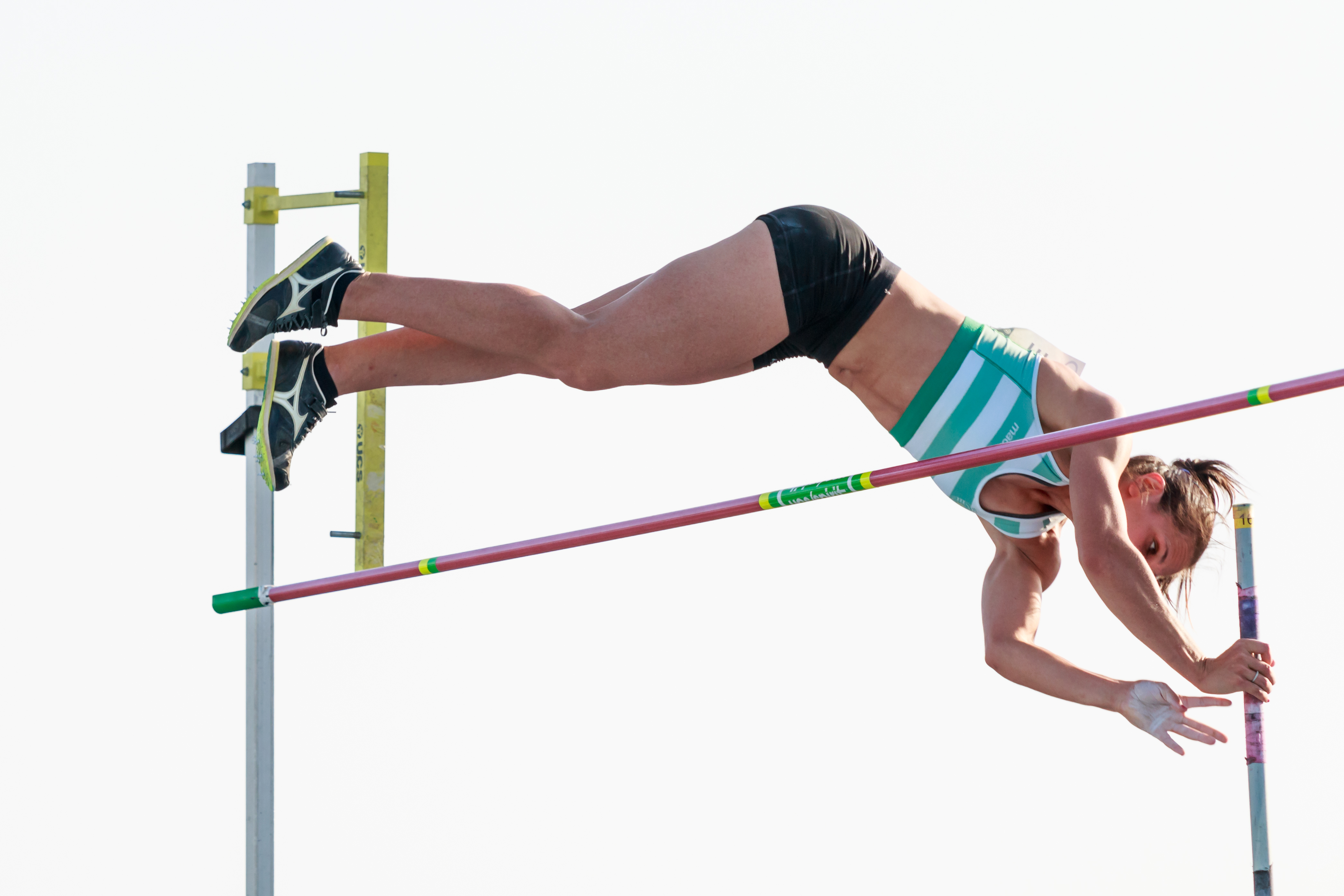 Marta Onofre (POR). Salto con garrocha. IAAF World Challenge. Meeting Madrid 2017. Moratalaz, Madrid.